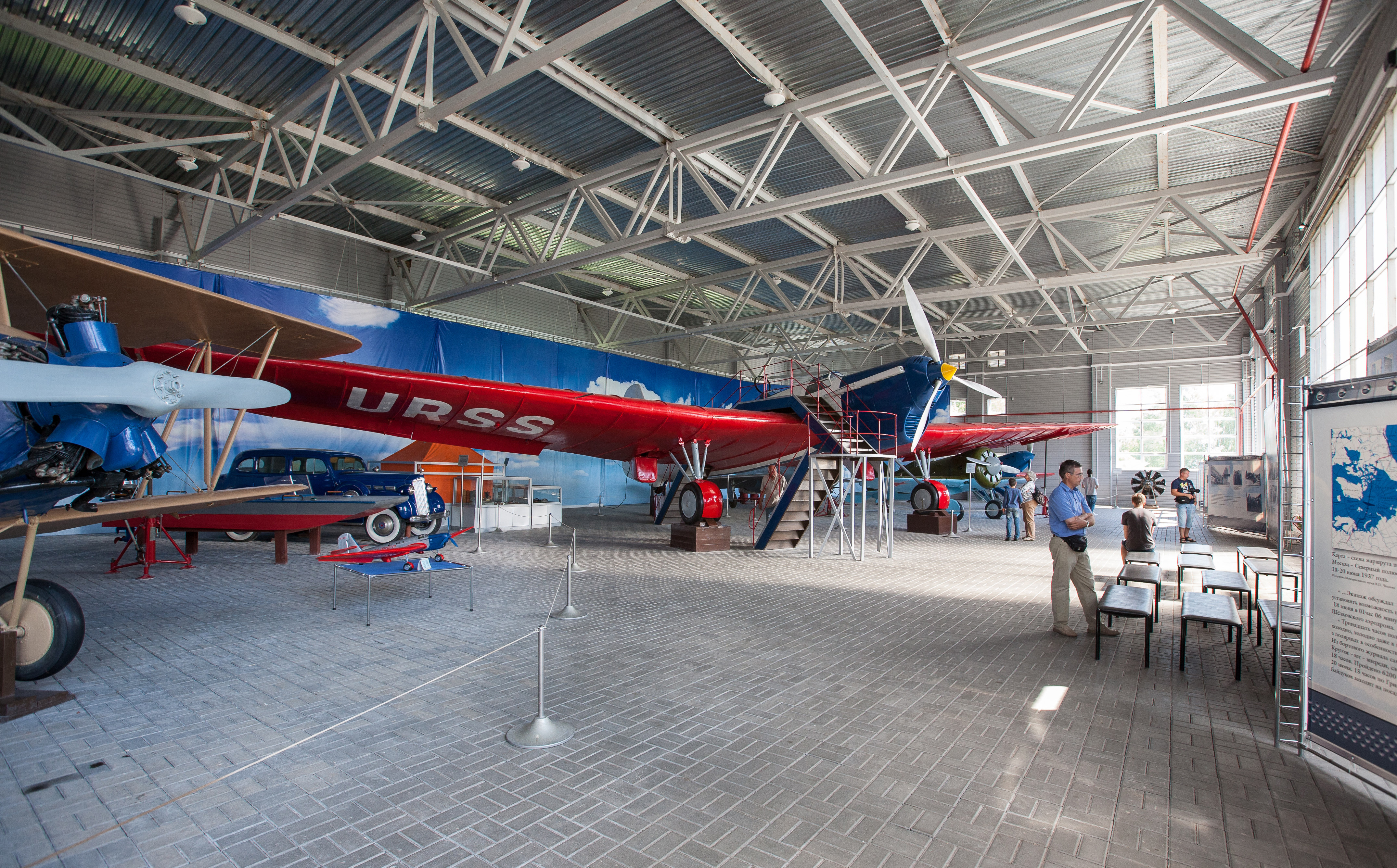 Ангар рядом с домом-музеем выдающегося советского лётчика Валерия Павловича Чкалова. Город Чкаловск (до 1937 года — Василёво) Нижегородской области. Самолёт АНТ-25, на котором чкаловский экипаж совершил два беспосадочных перелета: первый по маршруту Москва - Дальний Восток, и второй - через Северный полюс в Америку. Экспонируется в музее с 1956 года.